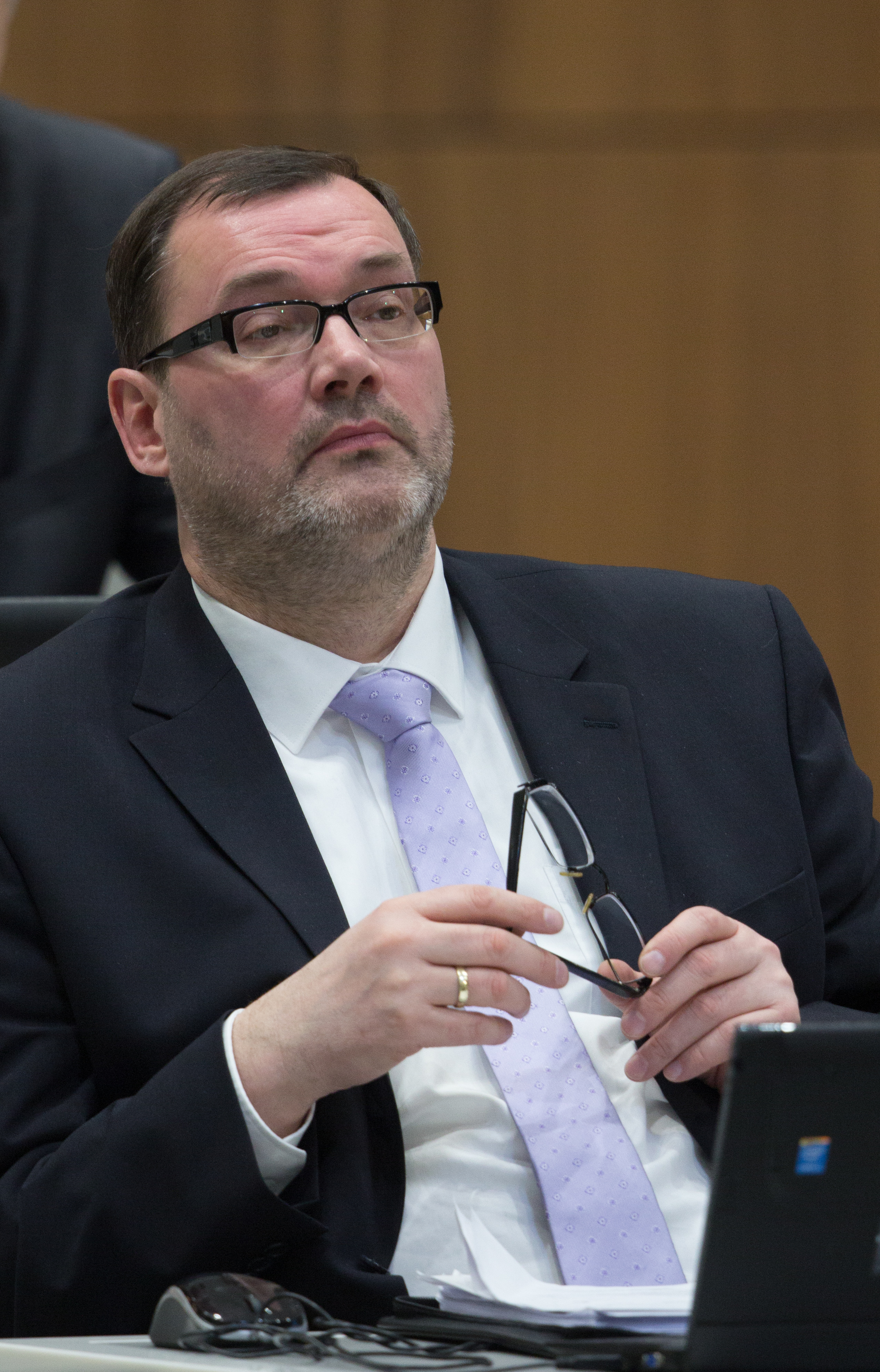 Klaus Wichmann am 28. Februar 2018 im Plenum des Niedersächsischen Landtages.